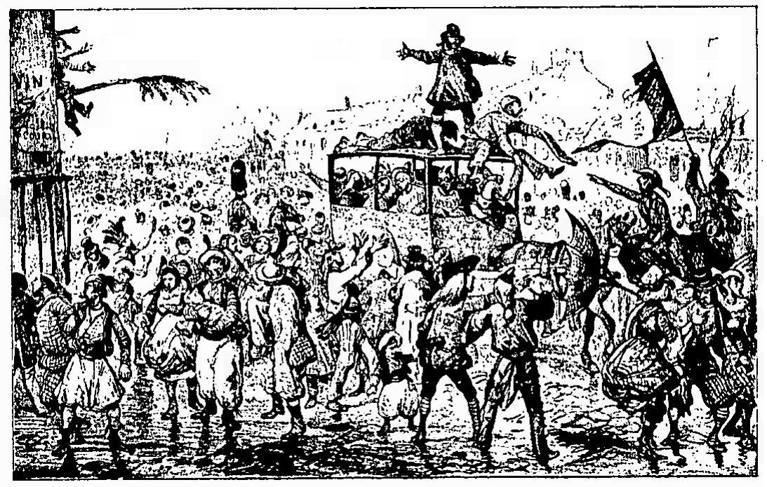 Vue de la Descente de la Courtille, fameux événement du Carnaval de Paris au XIXème siècle.